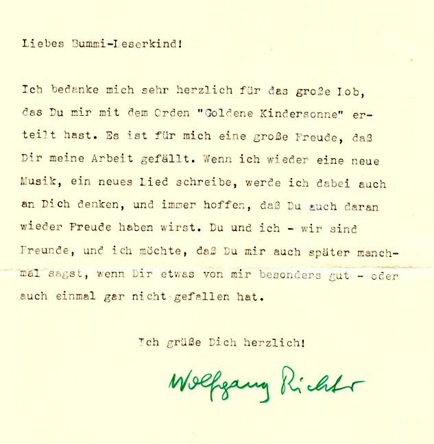 Mit diesem Brief bedankte sich Wolfgang Richter für die Auszeichnung mit einer "Goldenen Kinder-Sonne", einem Papier-Orden der DDR-Kinderzeitschrift "Bummi". Der vermutlich vom Verlag vorformulierte Text wurde in ähnlicher Form auch von anderen Künstlern verwendet.